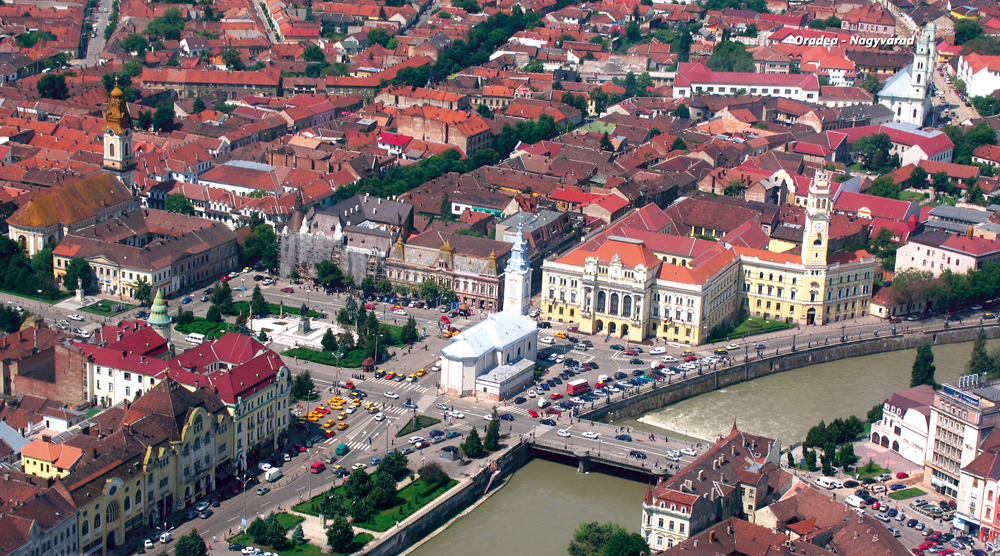 Poza aeriana de Ovi D. Pop/ Duran`s Oradea